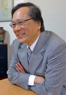 武田康弘 2011年1月白樺教育館にて撮影